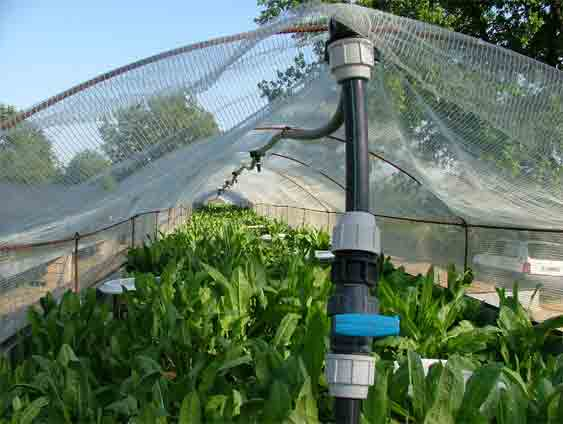 serra elicicola